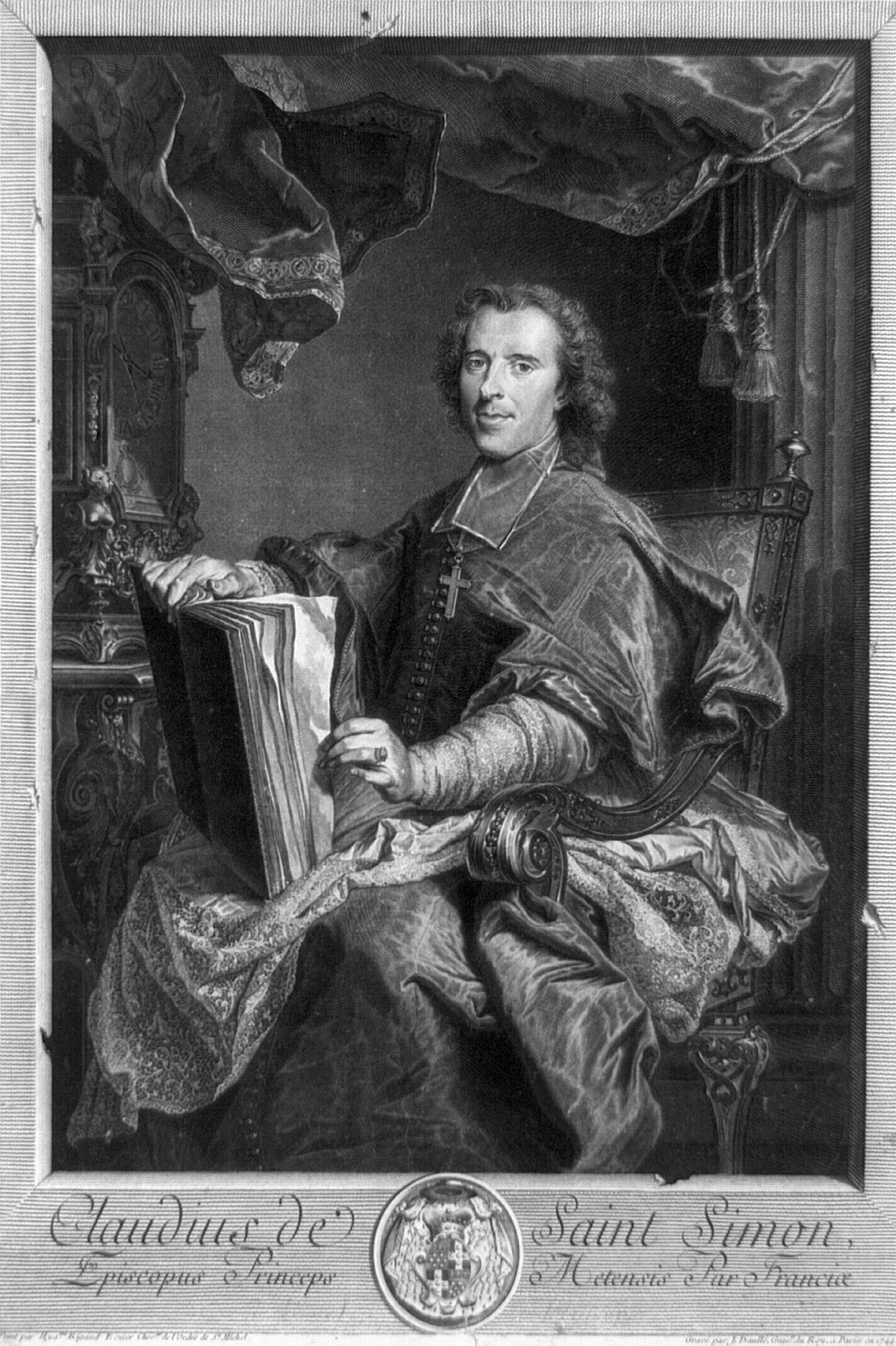 Portrait of Claude de Rouvroy de Saint-Simon (1695-1760), French bishop